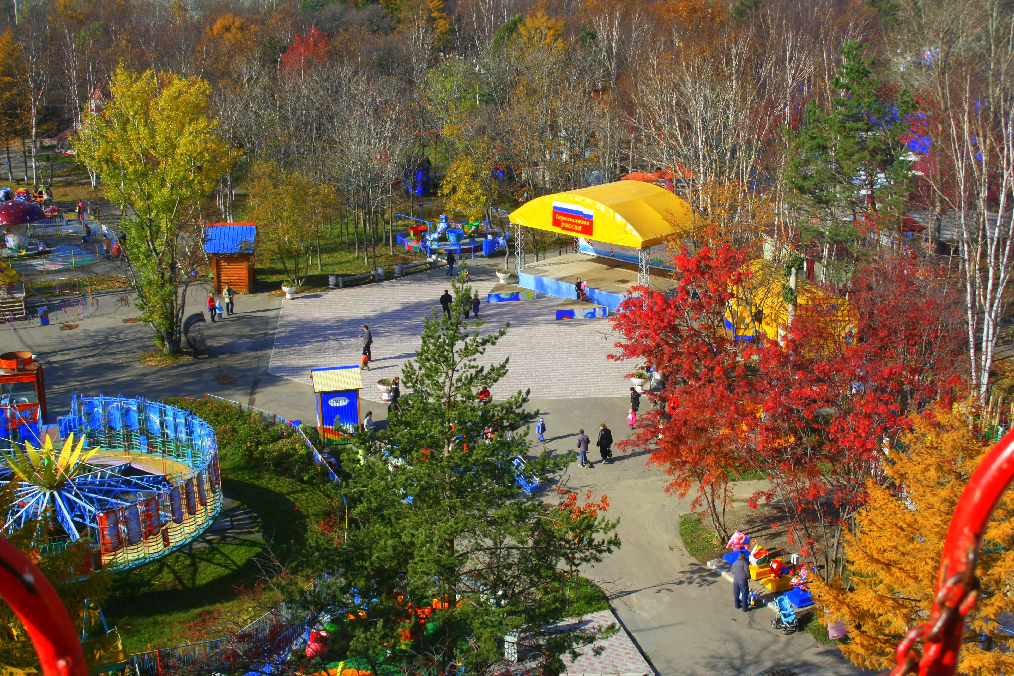 Осень в Парке